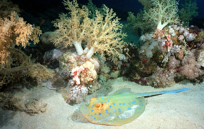 Taeniura lymma